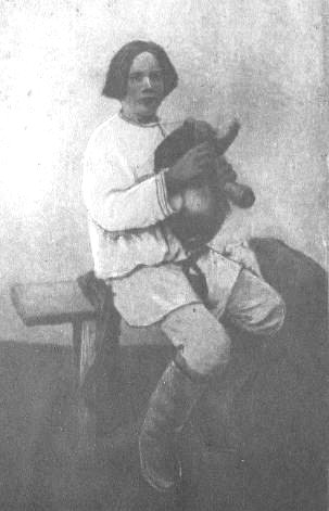 Юноша - мордвин с мордовской волынкой, которая называлась «пувама» у мордвы-эрзя или «фам» у мордвы-мокша. Фото конца XIX — начала XX века.